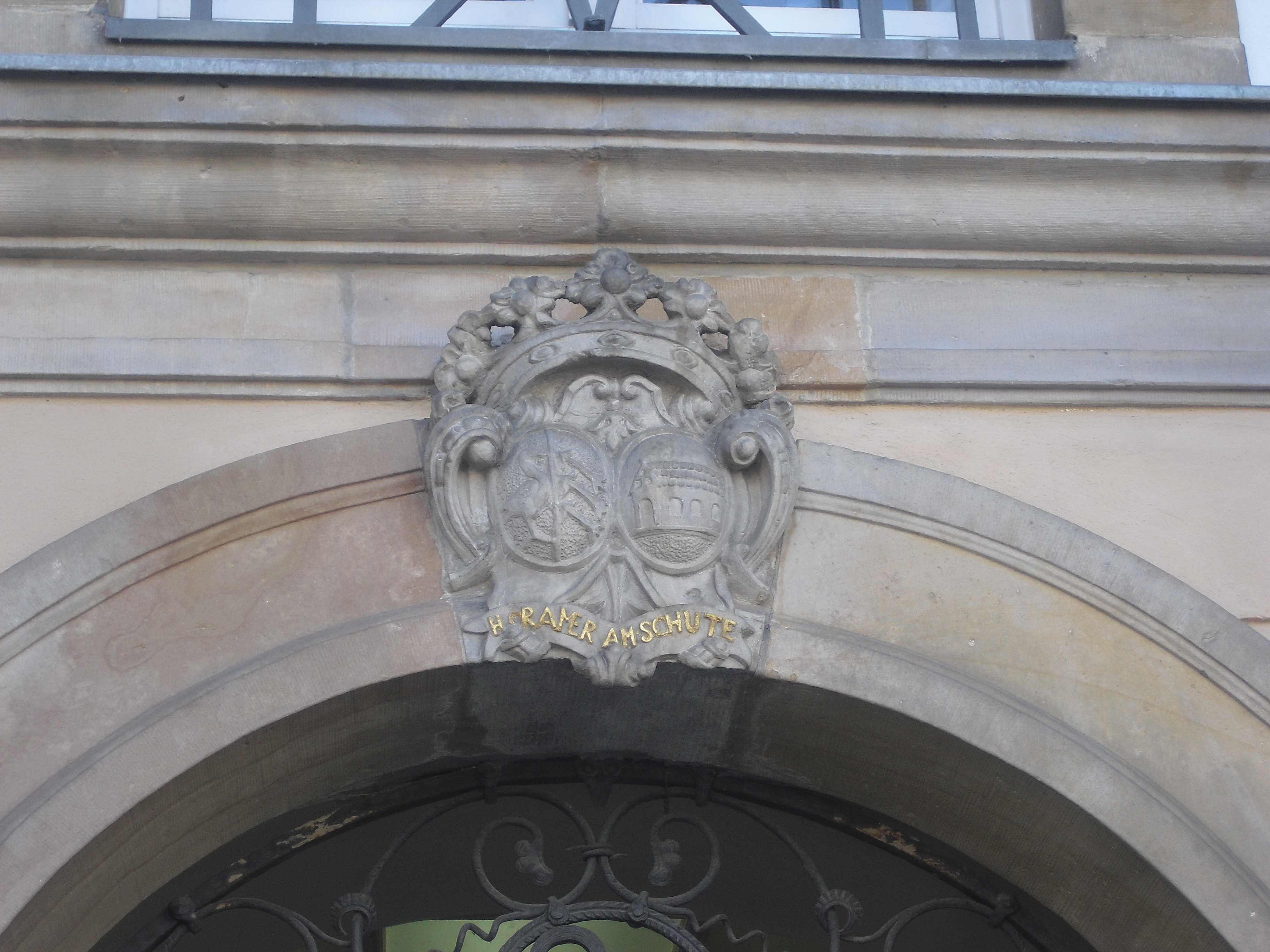 Allianzwappen am Portal Markt 6 in Paderborn. Wappen des Apothekers Heinrich Cramer (* 1. Januar 1694) und seiner Ehefrau A. Marg. Schulte (* 13. Juli 1700 in Delbrück; † 11. Dezember 1750)